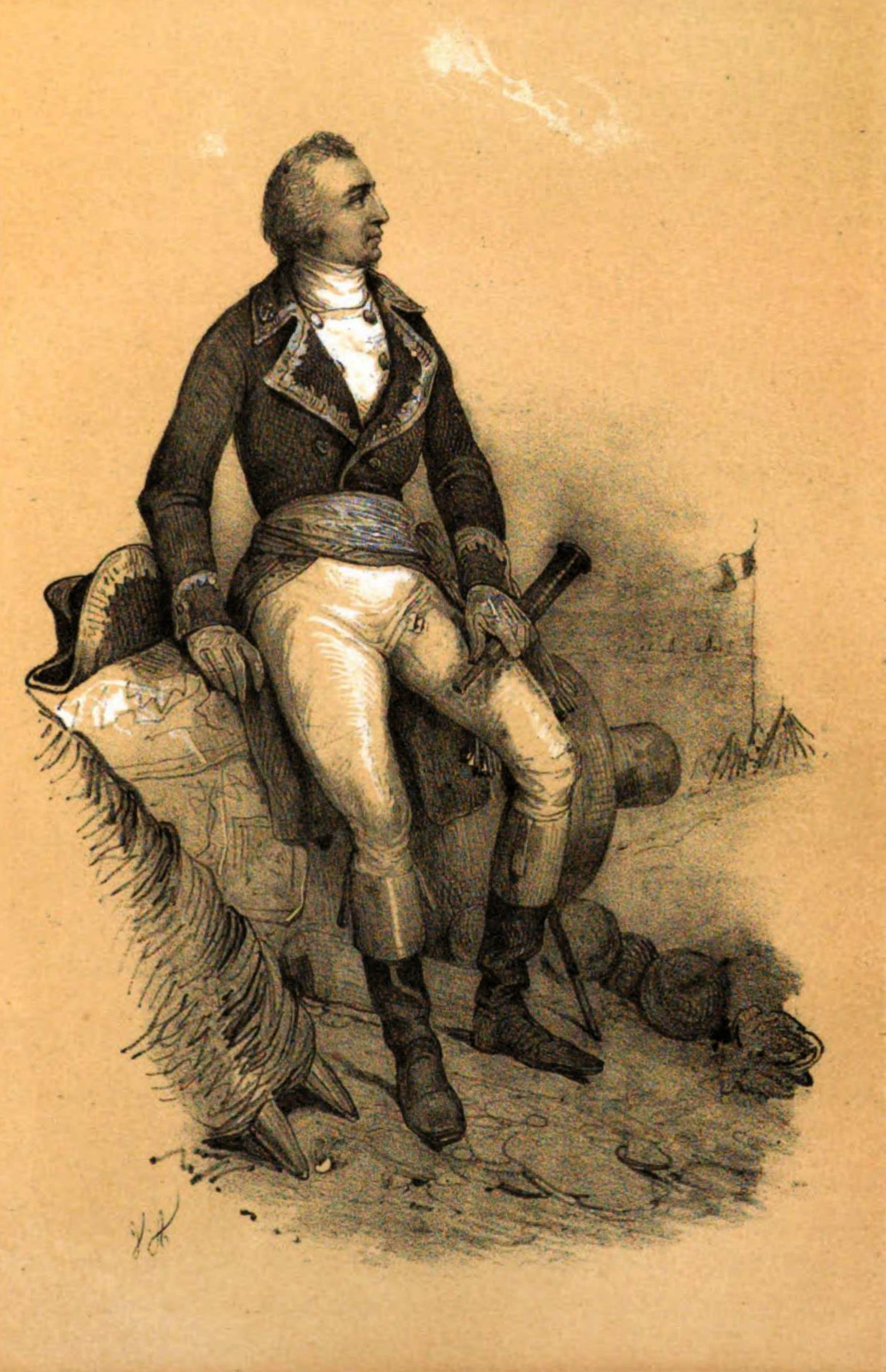 Louis-René Levassor de Latouche Tréville